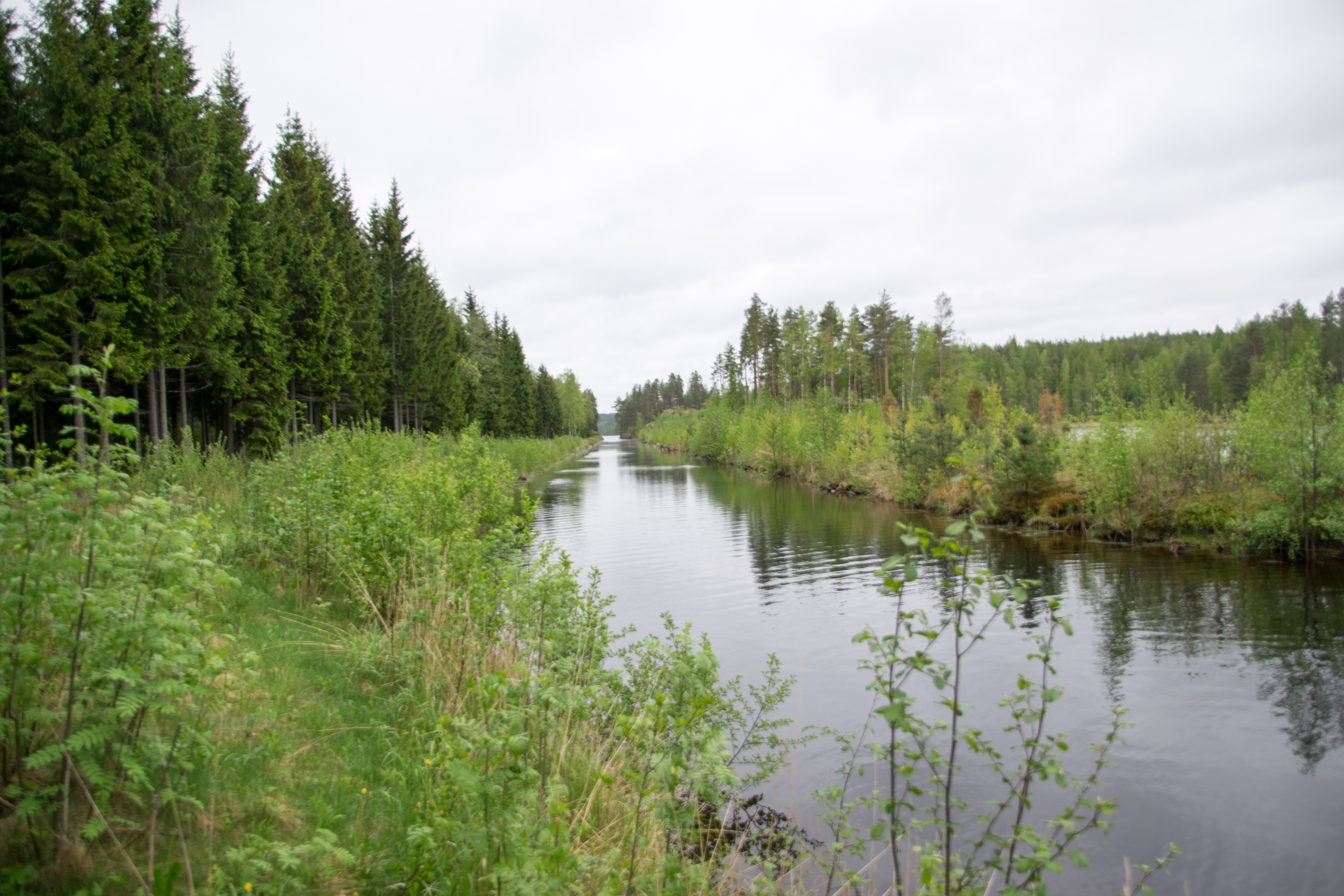 Kukonharjun kanava